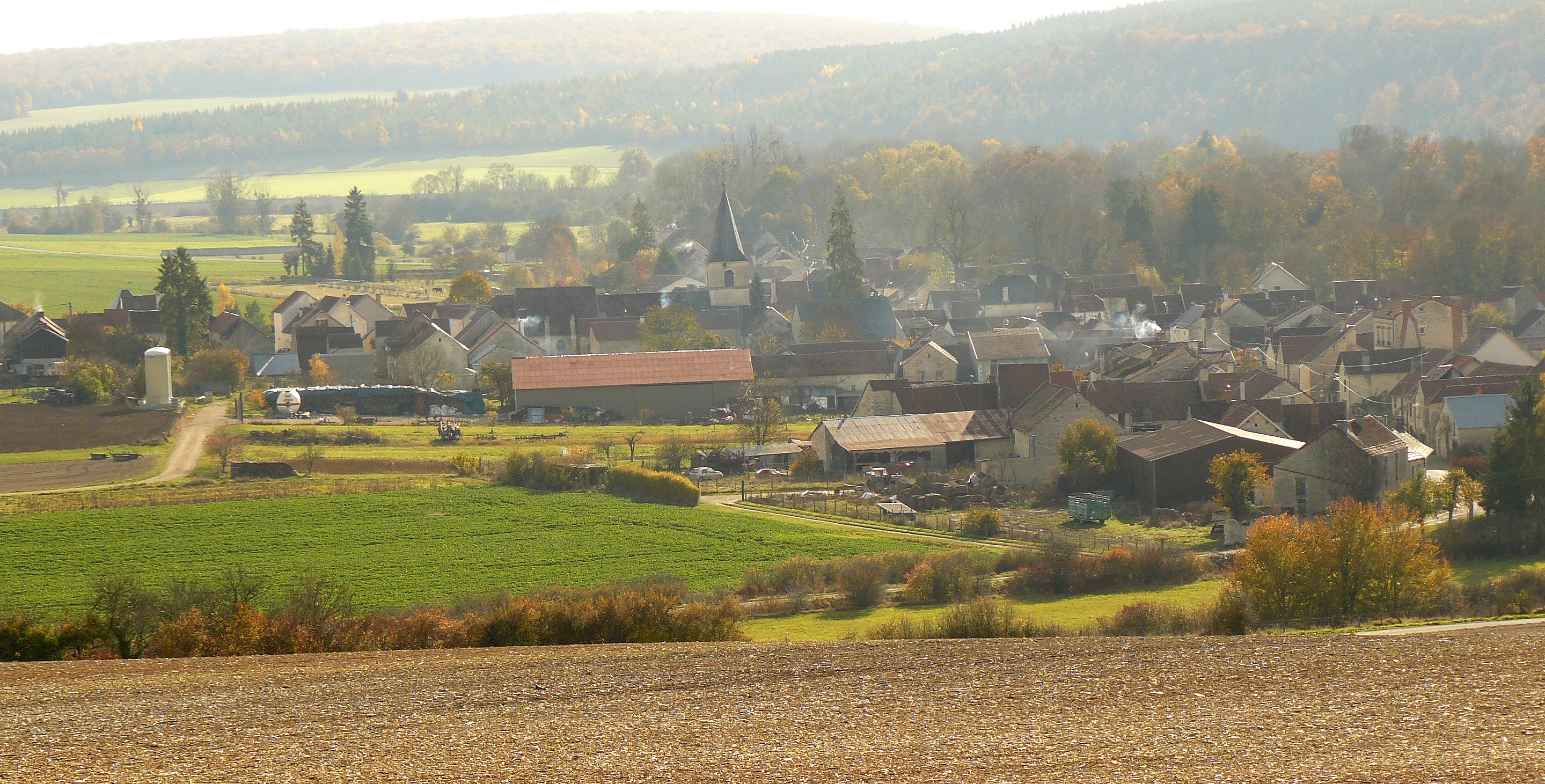 Autricourt, (Côte-d'Or - France), vue générale du village